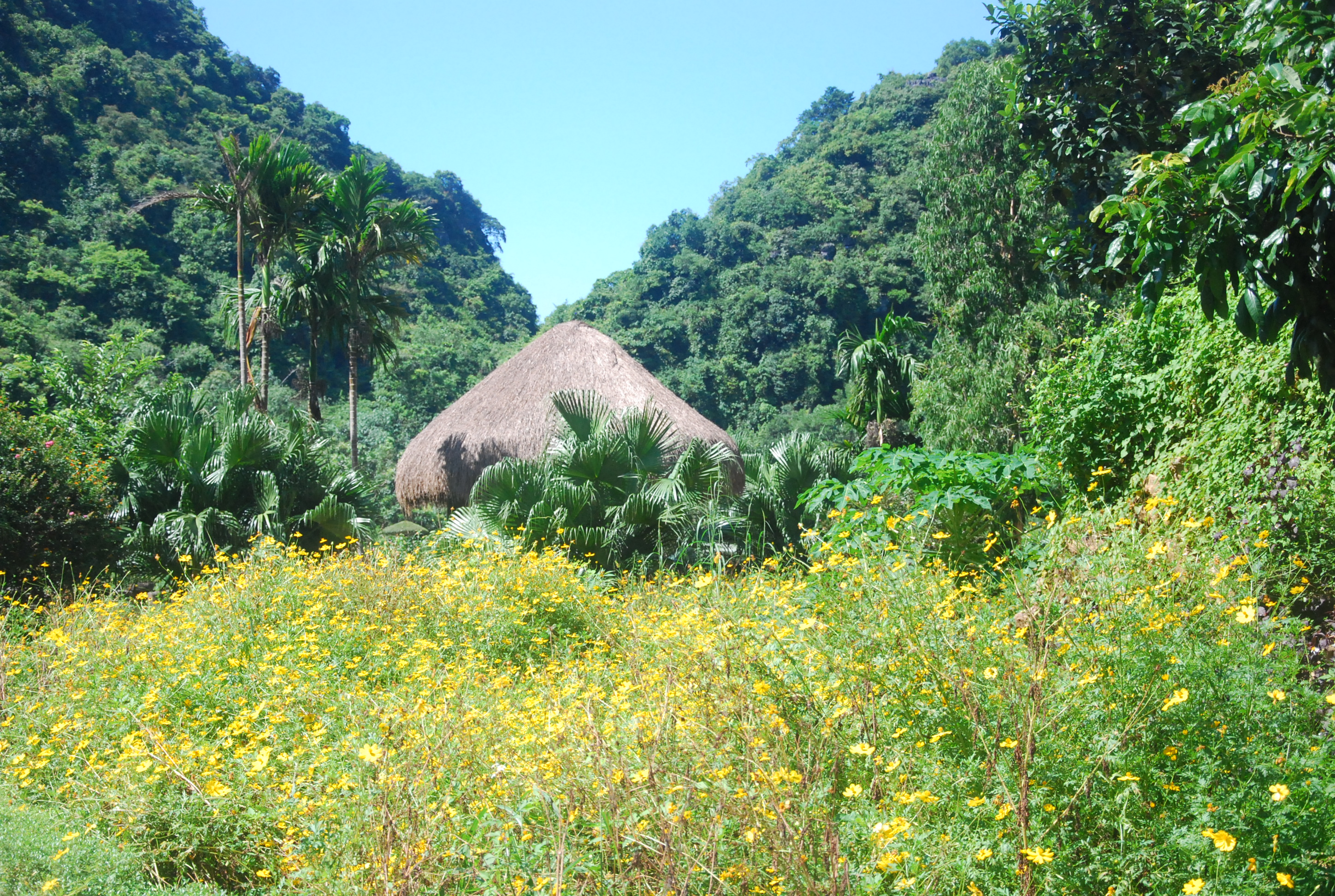 Phong cảnh Khu du lịch sinh thái Thung Nham ở Ninh Bình